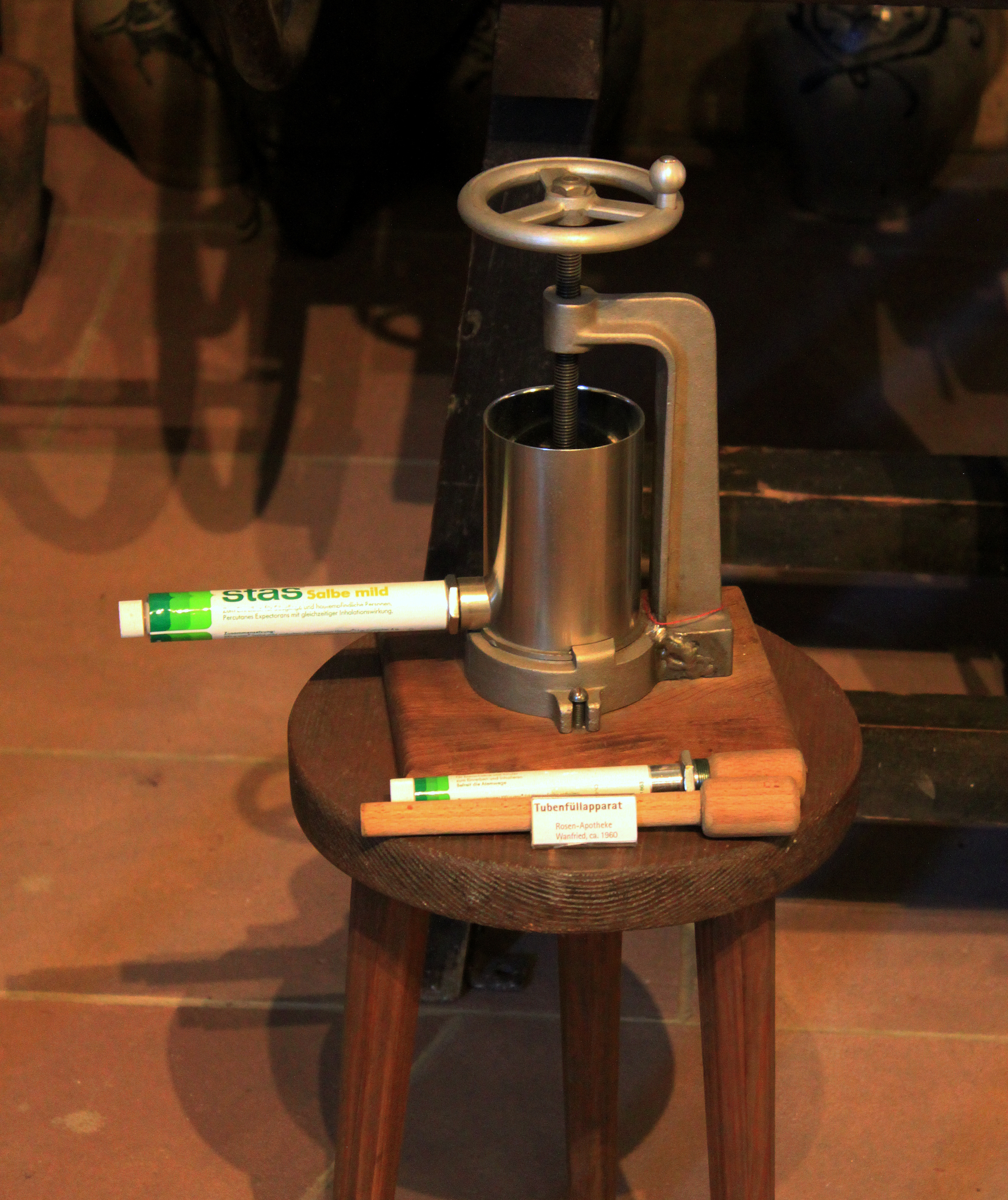 Manueller Tubenfüllapparat, ca. 1960. Ausstellungsstück im Deutschen Apotheken-Museum, Heidelberg.